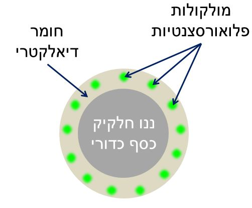 פלסמופור כדורי